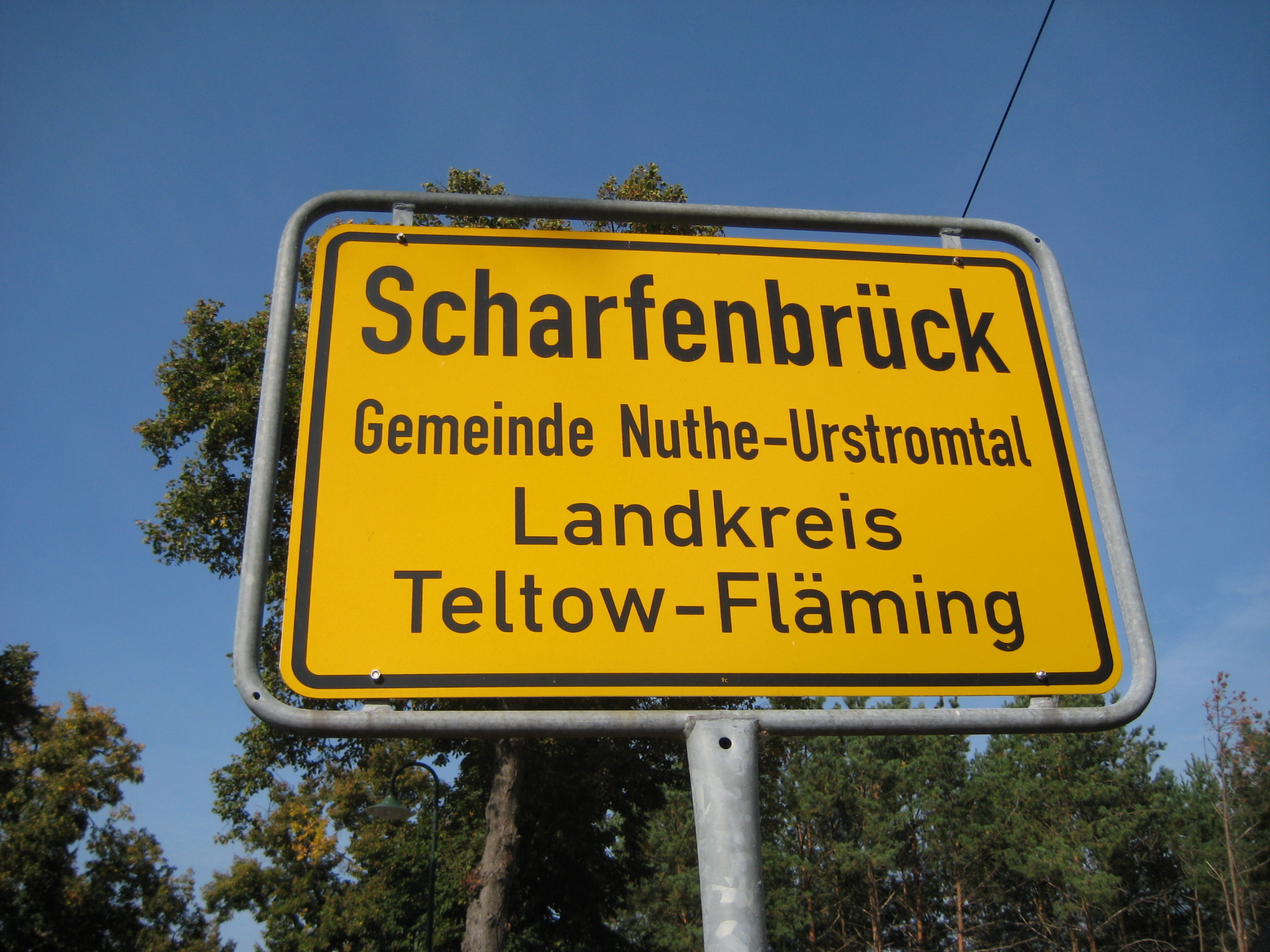 Ortseingang Scharfenbrück